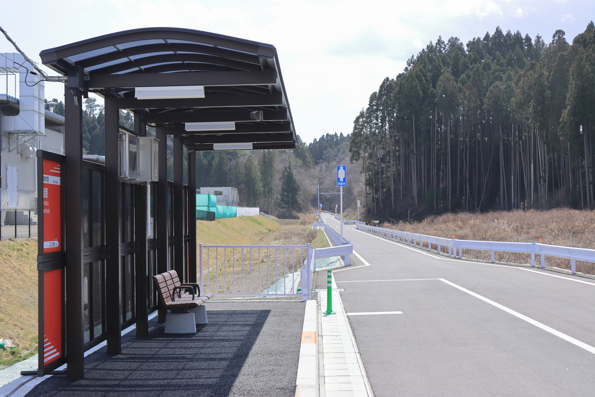 2020年3月14日に開業した、JR気仙沼線BRT赤岩港駅の柳津方面行き乗降場。